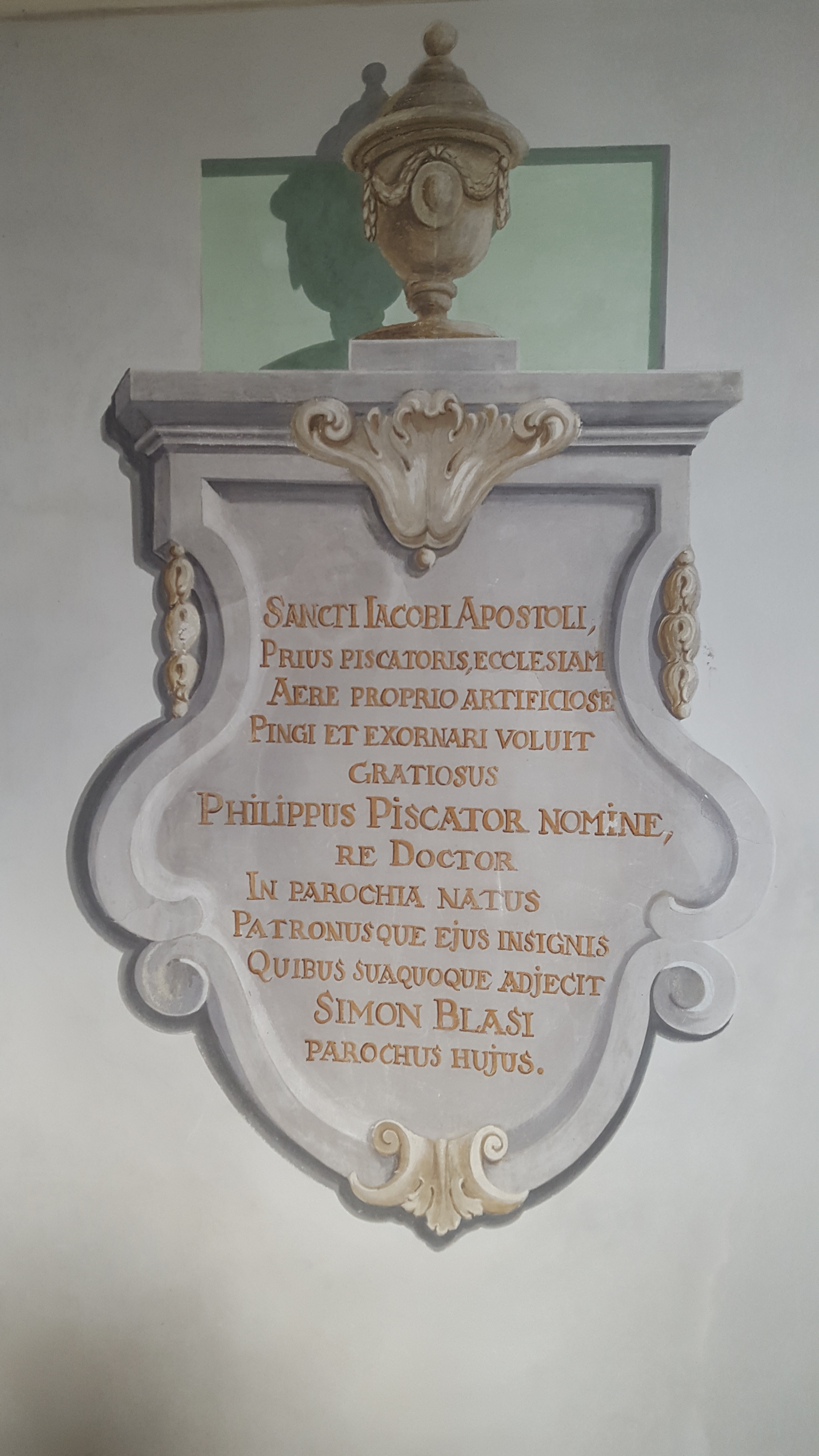 Gedenkfresko für die Kirchenausmalung 1790 an Philipp Fischer und Simon Blasi in der Armeseelen Seitenkapelle in der St. Jakobus der Ältere Pfarrkirche in Hörgertshausen.